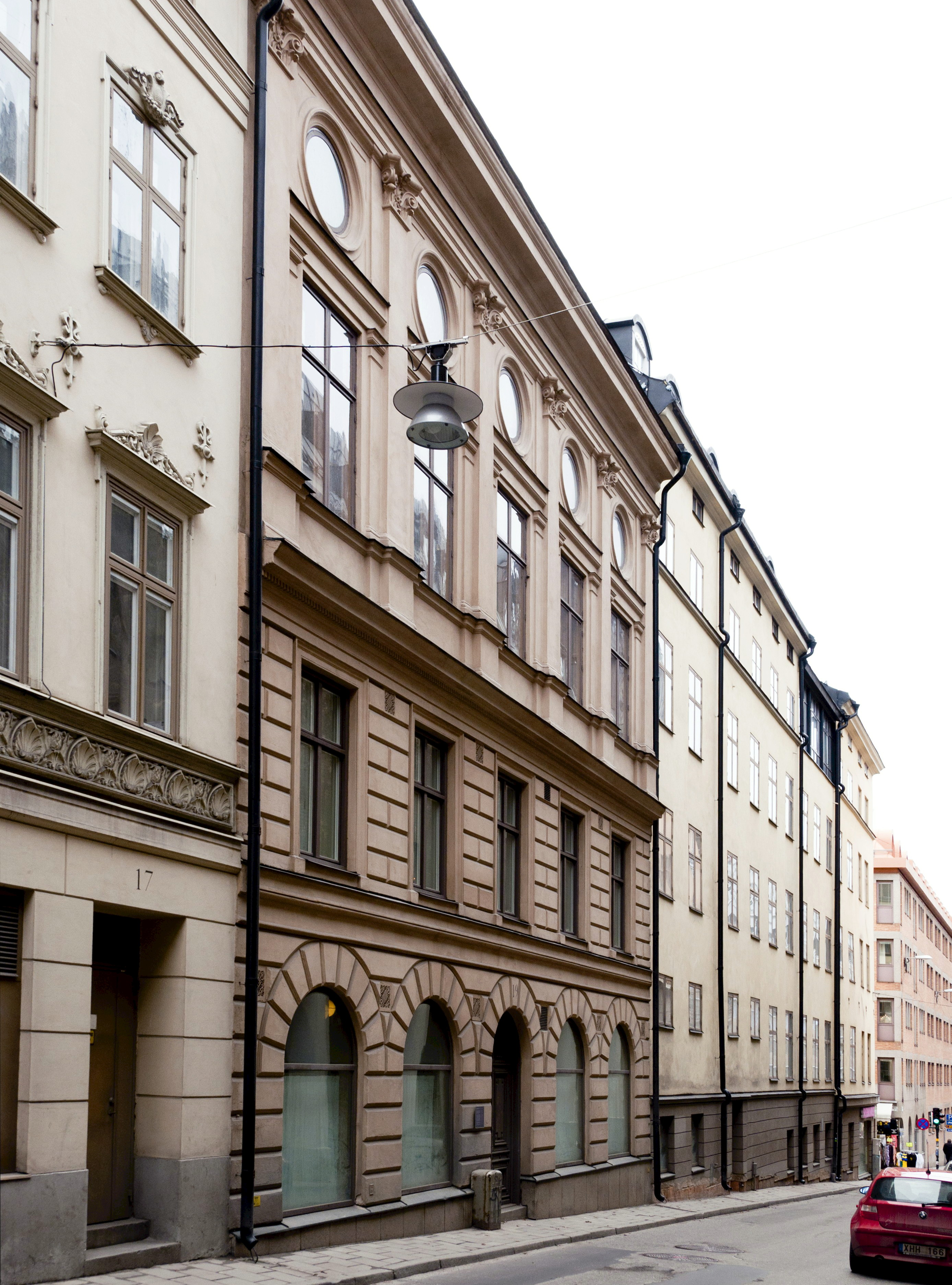 Jakobsgatan 19, kv. Johannes Större 7. Okänt byggnadsår. Fasadutformning från 1878 (bakgrunden Kanngjutarmästarens hus]